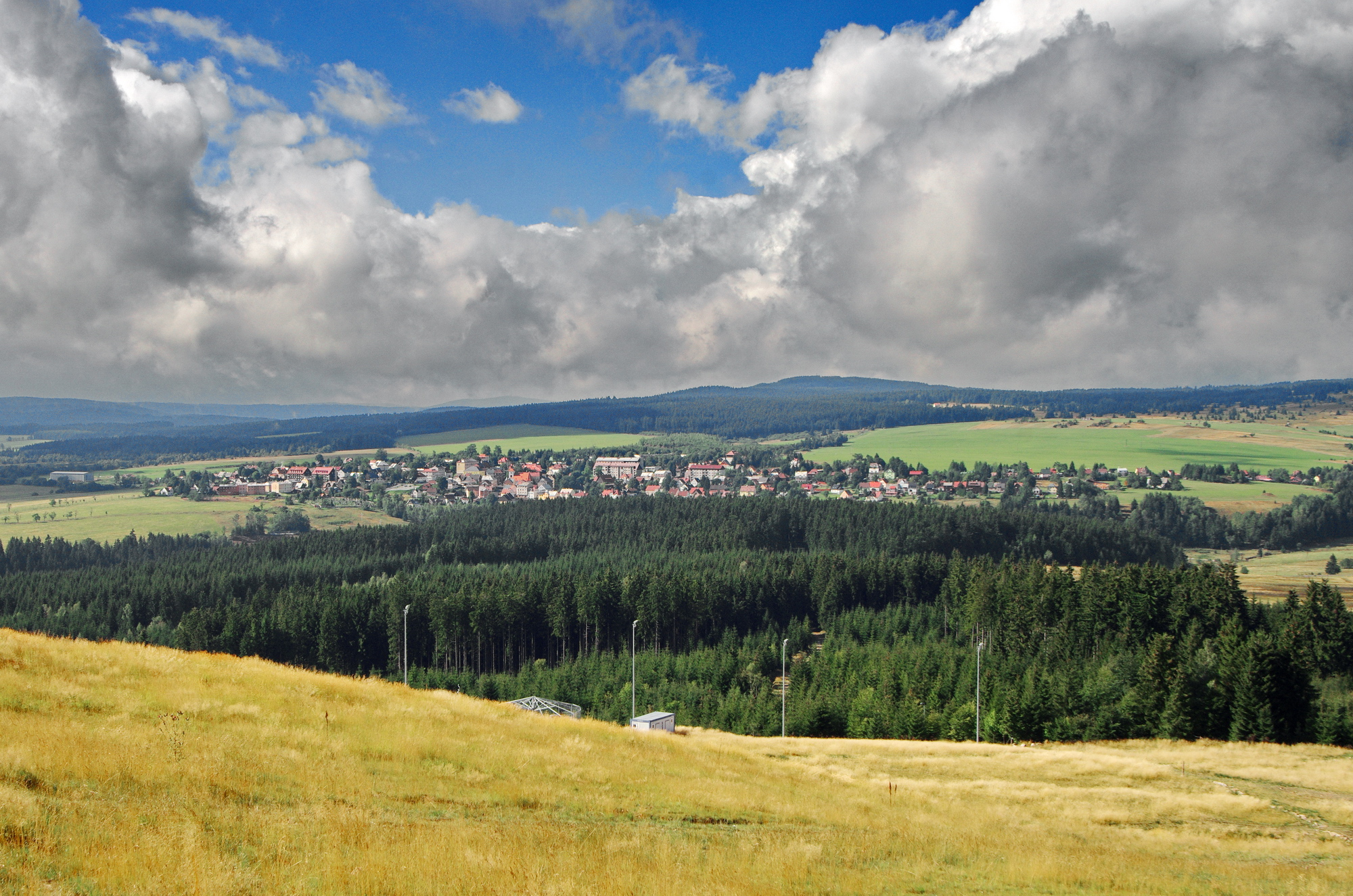 Plešivec (1028 m), pohled na Abertamy, Krušné hory, okres Karlovy Vary